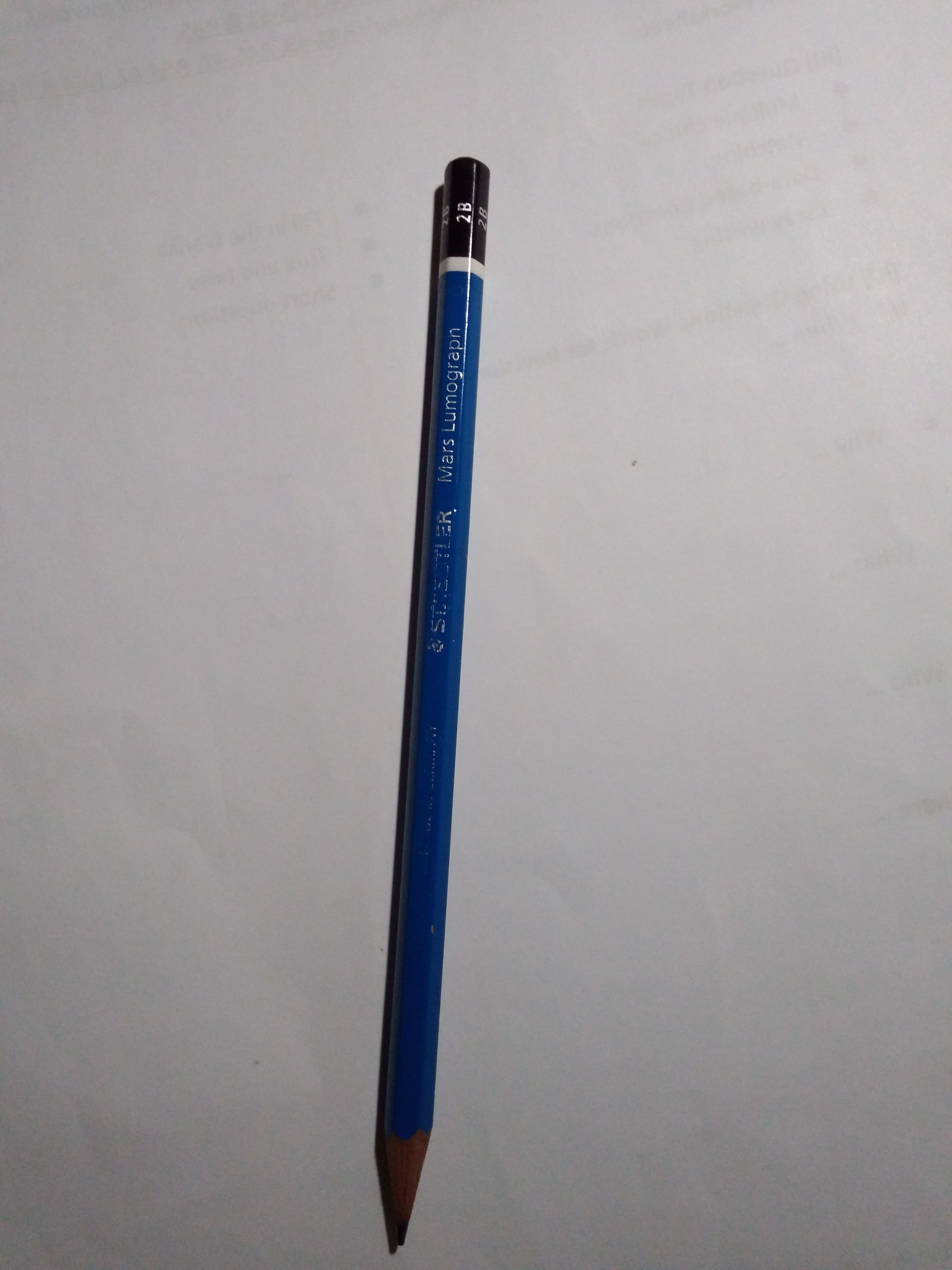 2b pencil